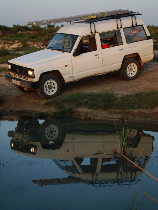 Nissan Patrol RD28 Largo techo alto, nueve plazas